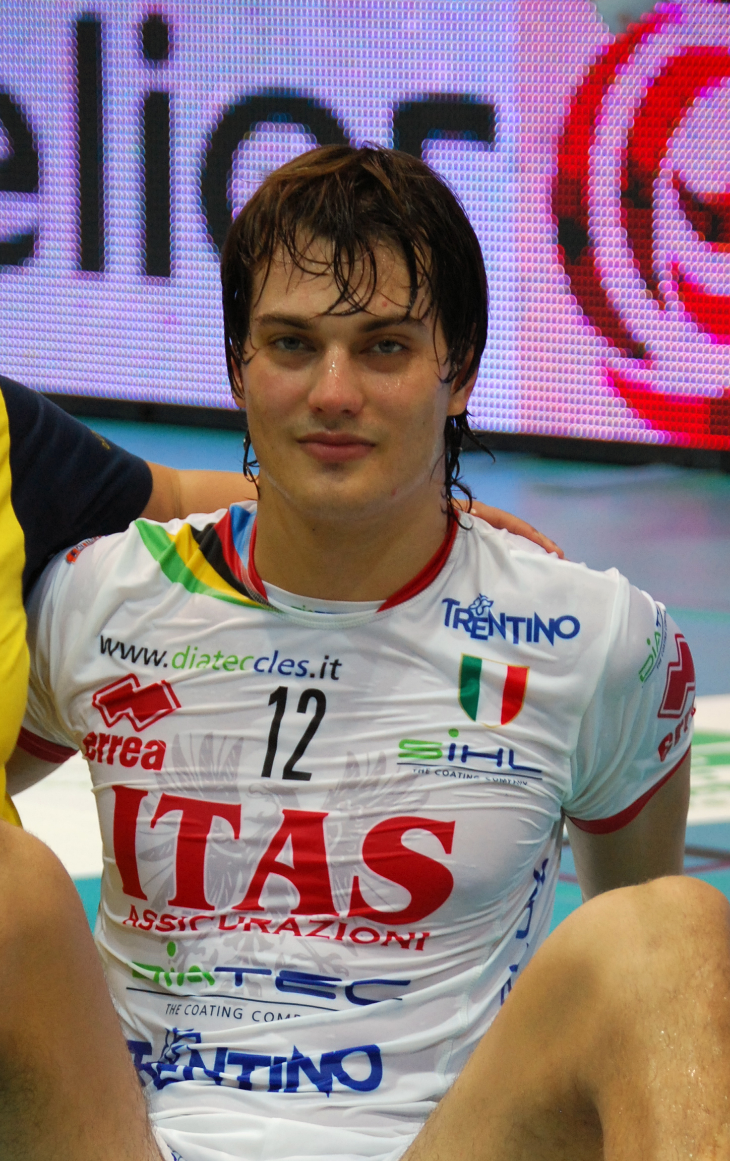 Foto che ho scattato al Palabanca di Piacenza in occasione della partita Copra-Trento